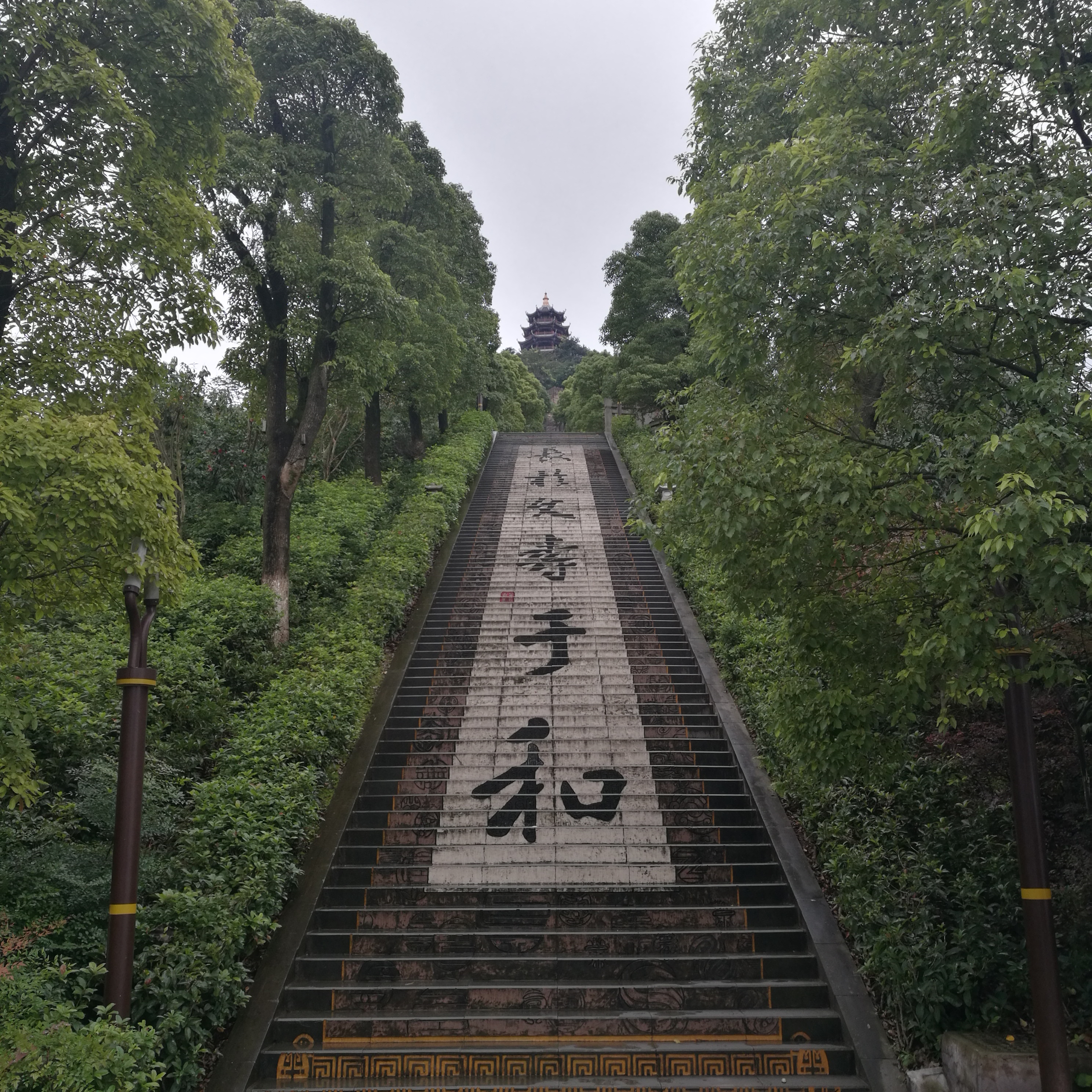 菩提山万寿天梯